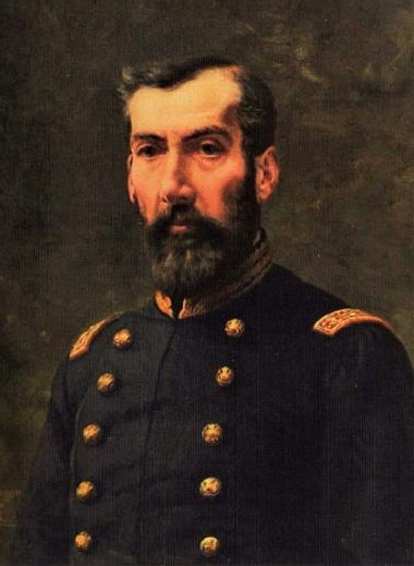 Óleo sobre tela de Pedro Lira Rencoret; año 1898, Retrato del General Marcos Segundo Maturana Molina nació en Santiago de Chile, el 15 de febrero de 1830 y falleció en la misma ciudad el 18 de mayo de 1892. Fue un militar y héroe de guerra chileno.